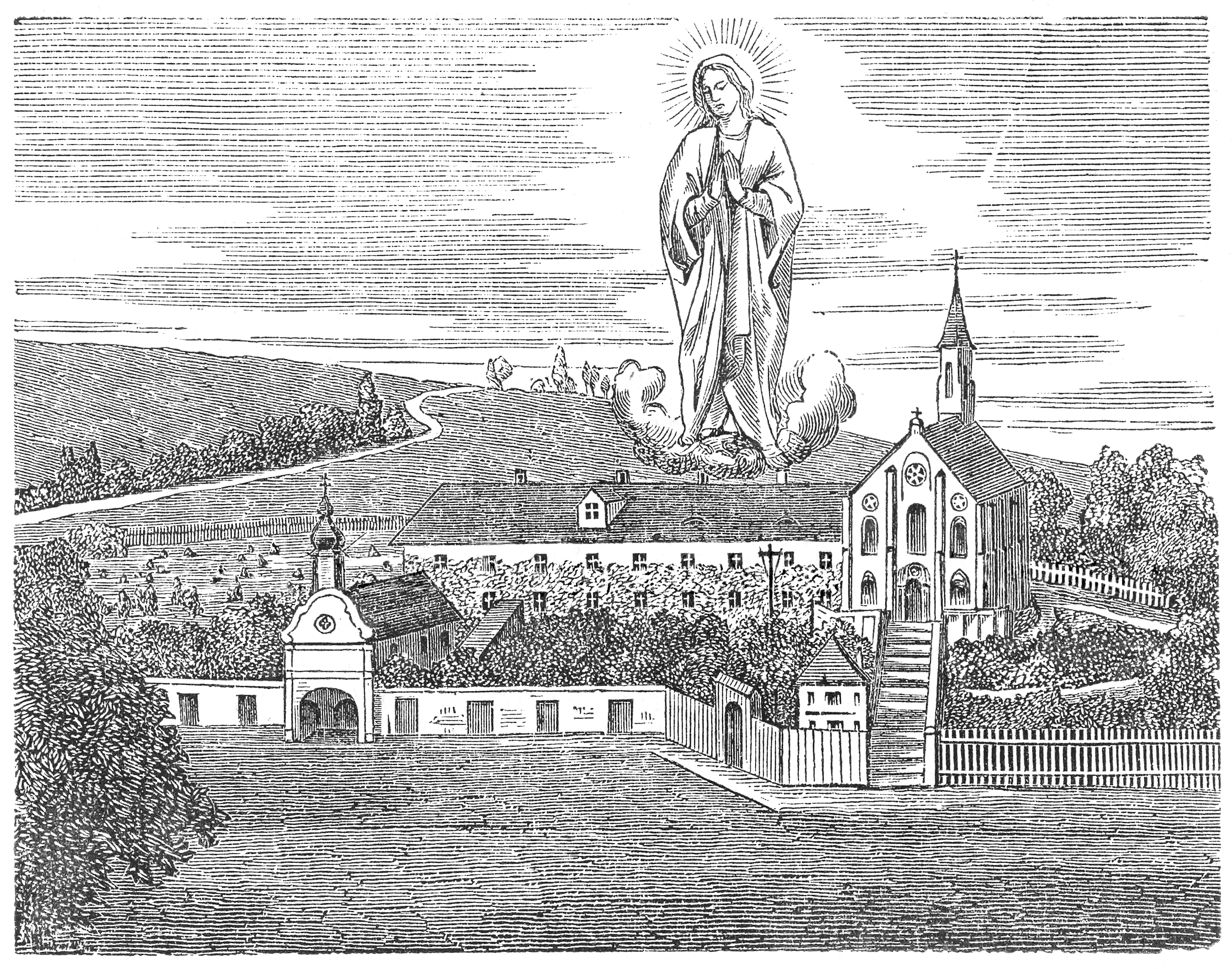 Neues Franziskanerkloster in Dingolfing, Niederbayern (Vorgängerbau an anderer Stelle wurde 1802 säkularisiert, und die Klosterkirche abgebrochen). Von den Franziskanern 1972 aufgegeben. Seit 1975 Standort des Klarissenklosters. In: Kalender für katholische Christen auf das Jahr 1873 (= Jahrgang 33). J. E. v. Seidel’sche Buchhandlung, Sulzbach in der Oberpfalz. 8,9 x 11,4 cm. Sign.: S/ZMk 4-33+2 (Staatliche Bibliothek Passau)